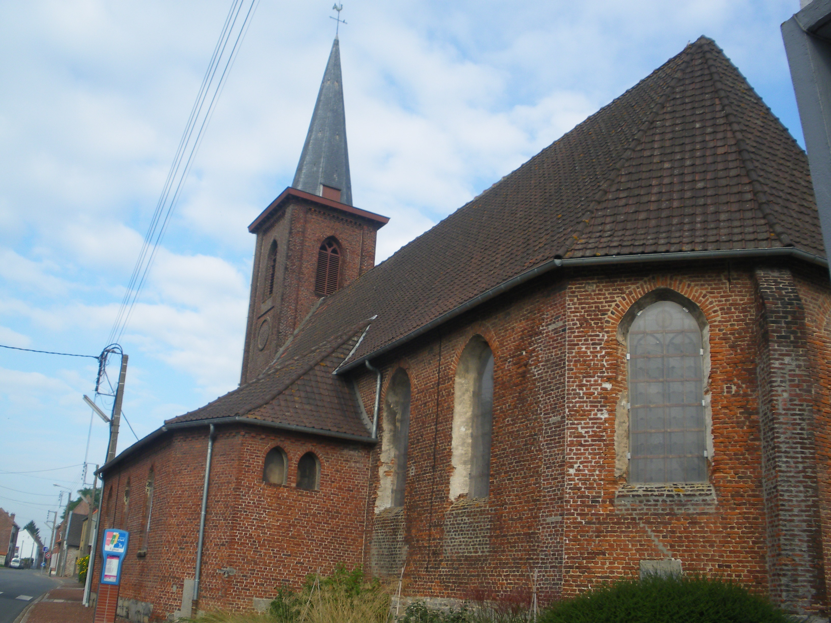 Vue de l'église Sainte-Cécile de Wannehain dans le département du Nord.